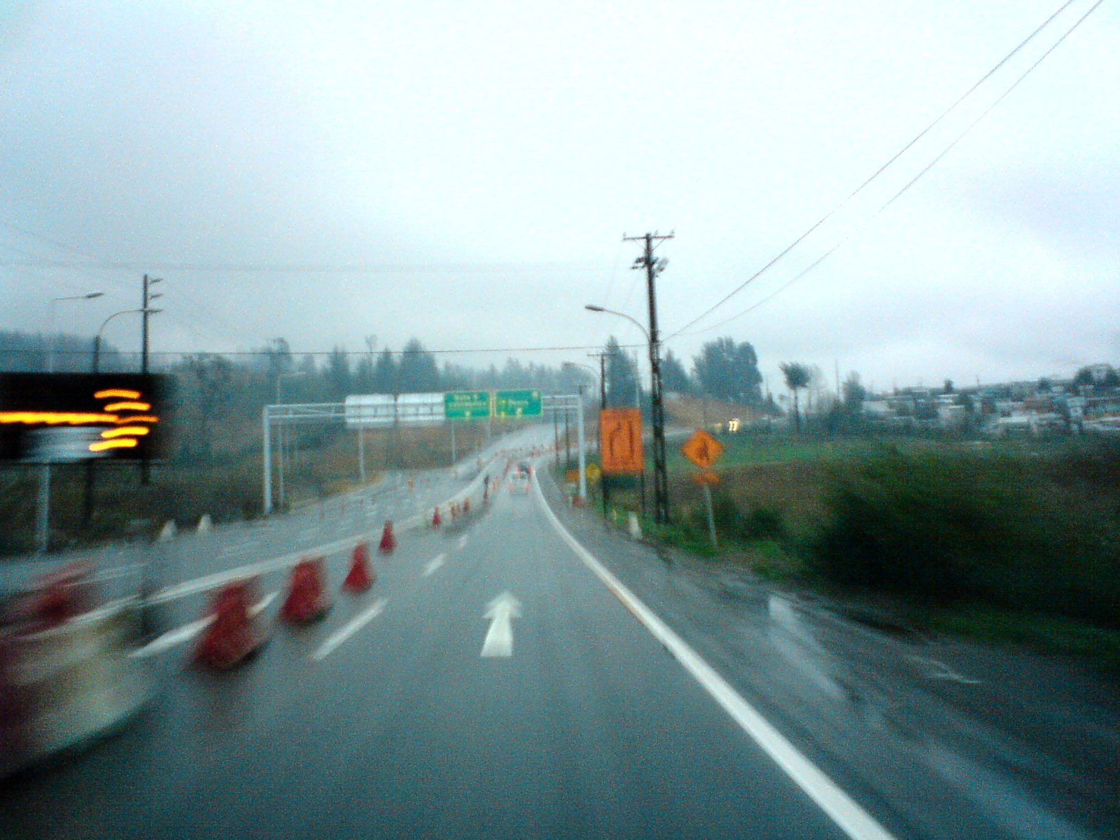 ruta 150